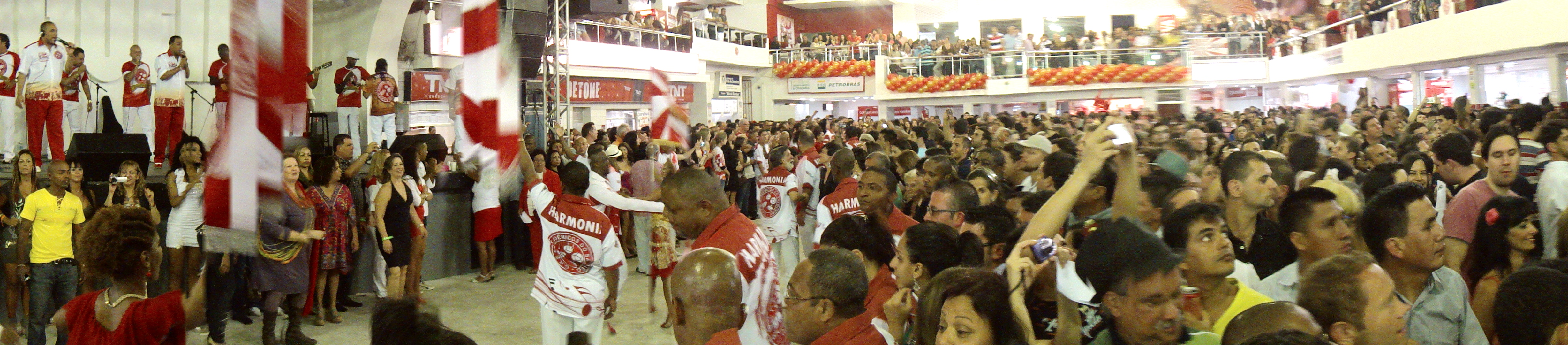 Acadêmicos do Salgueiro - 16